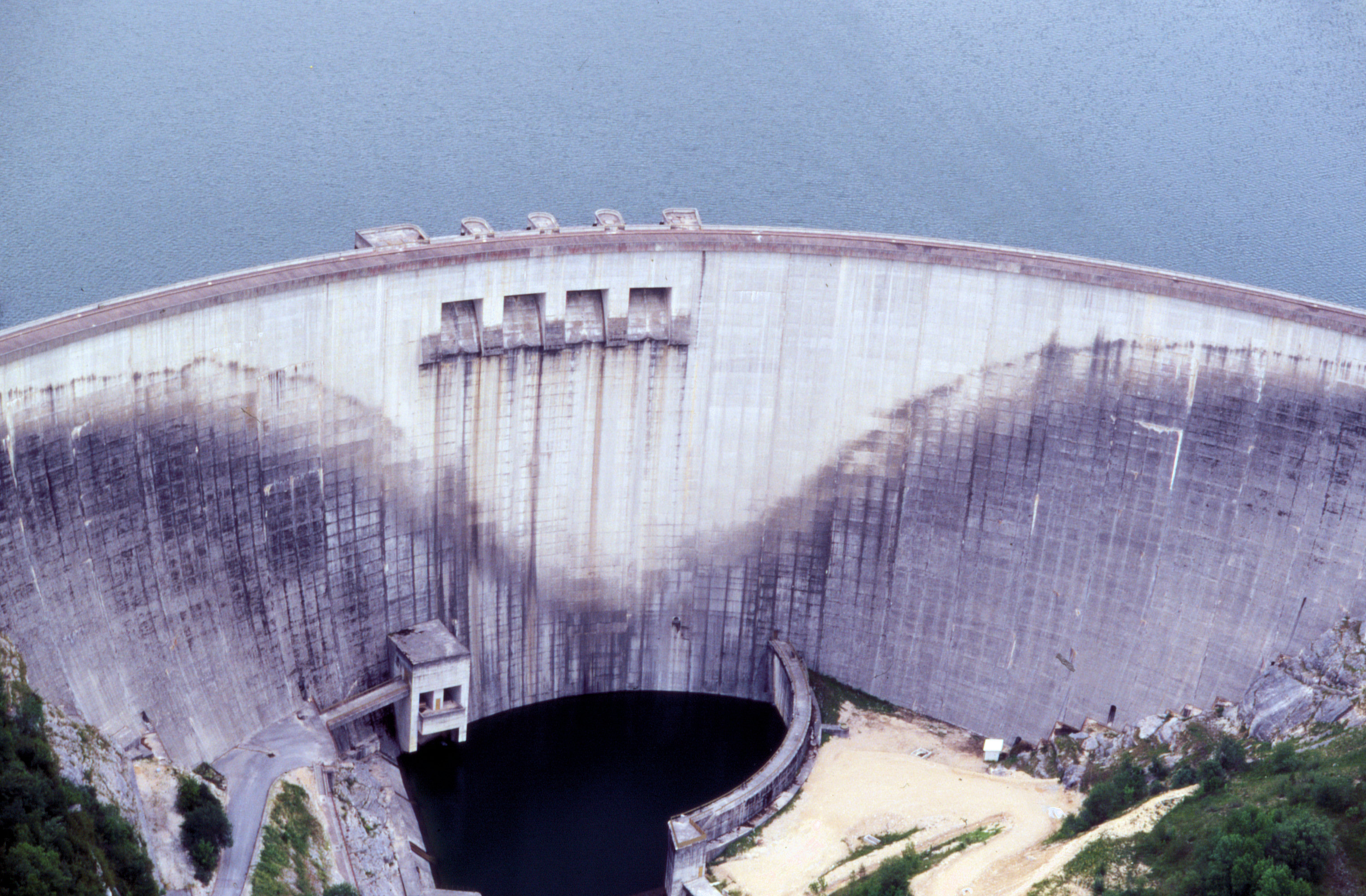 Barrage de Vouglans